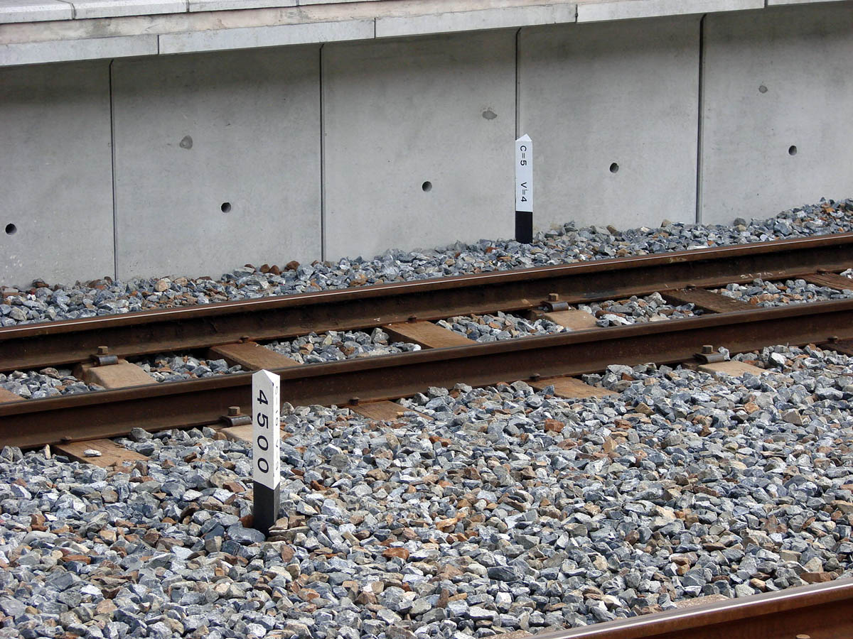 曲線標